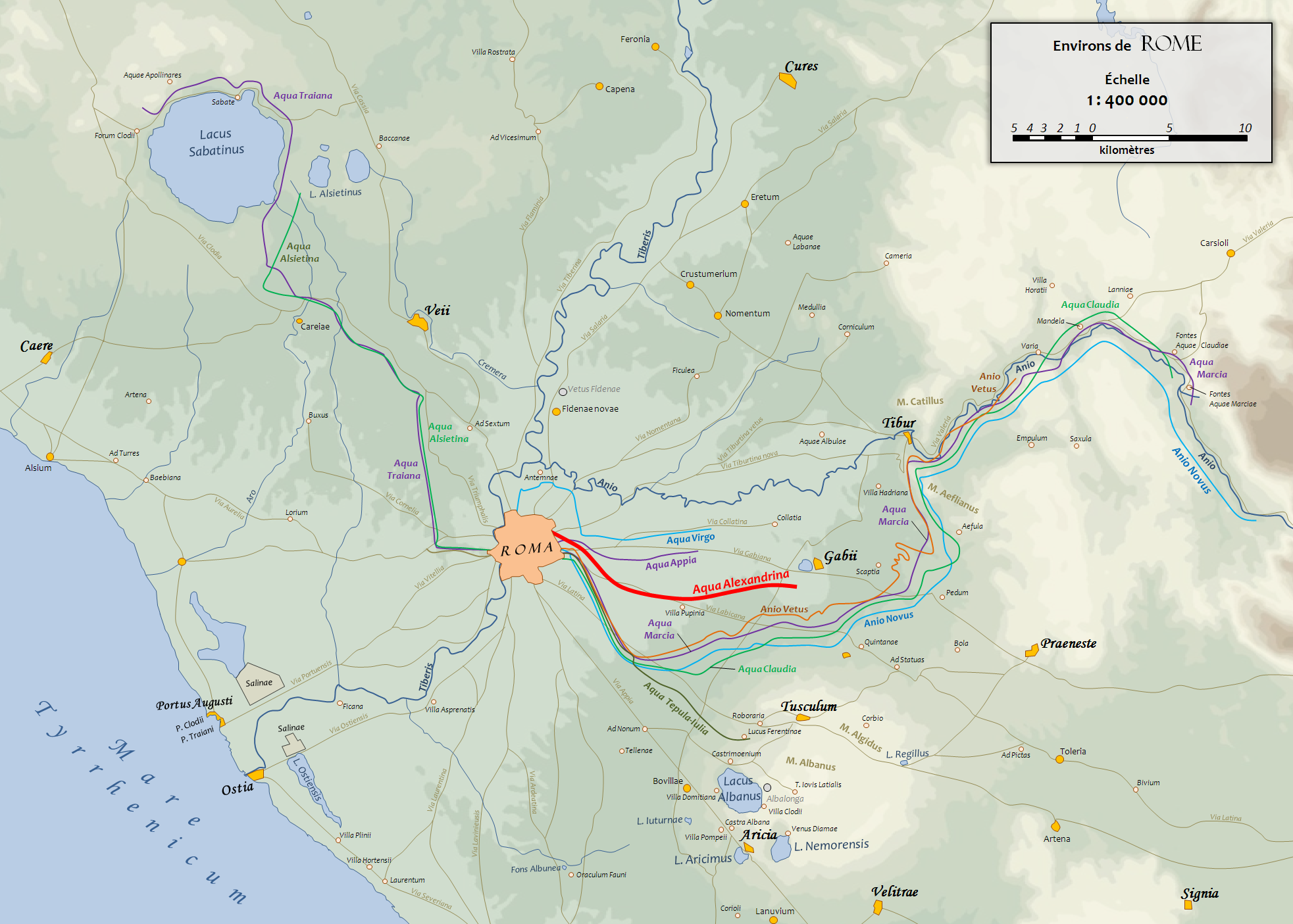 Carte du Latium antique sur lequel figure le tracé des aqueducs de Rome. D'après un fond de carte de 1886 (G. Droysens Allgemeiner Historischer Handatlas).